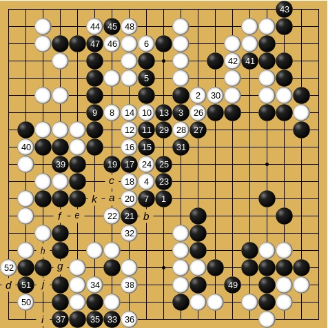 168手 白中押勝ち